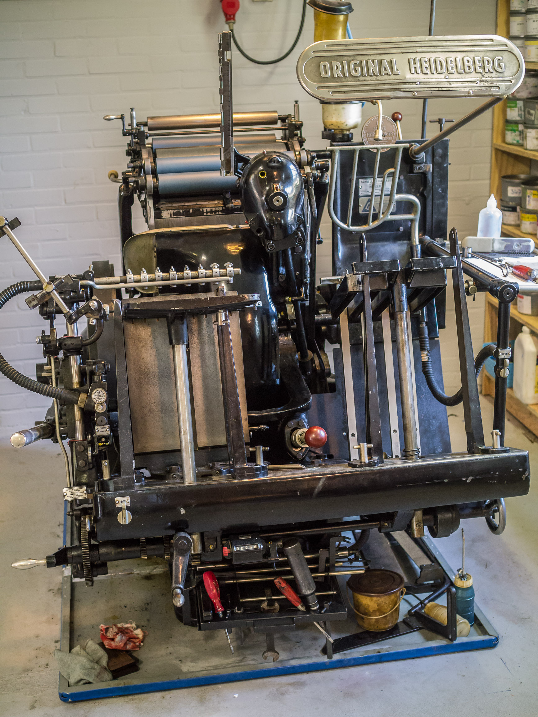 Openluchtmuseum Ellert en Bammert te Schoonoord - Heidelberg drukpers